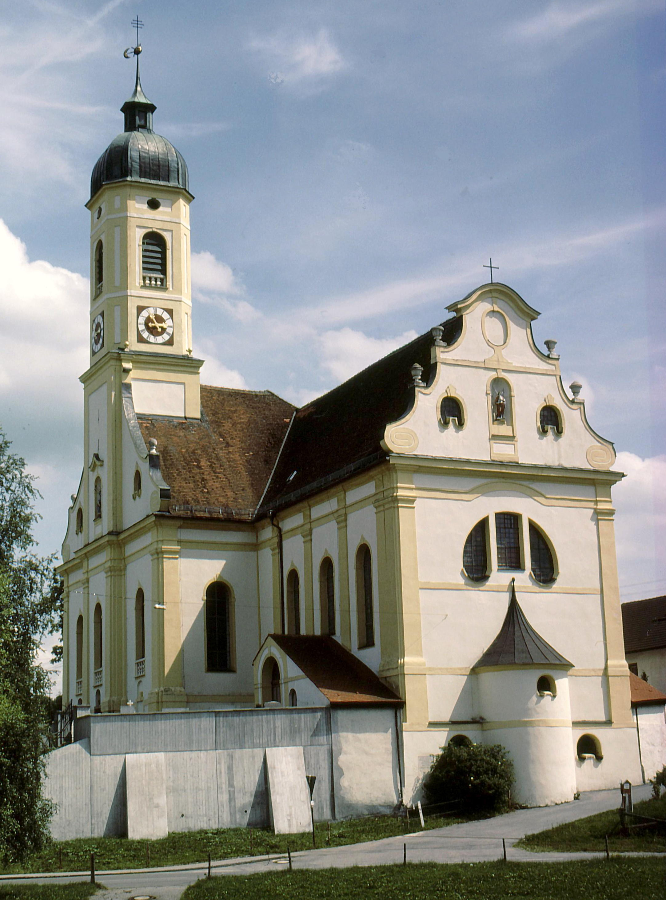 Kirche in Bertoldshofen/Ostallgäu von Johann Georg Fischer